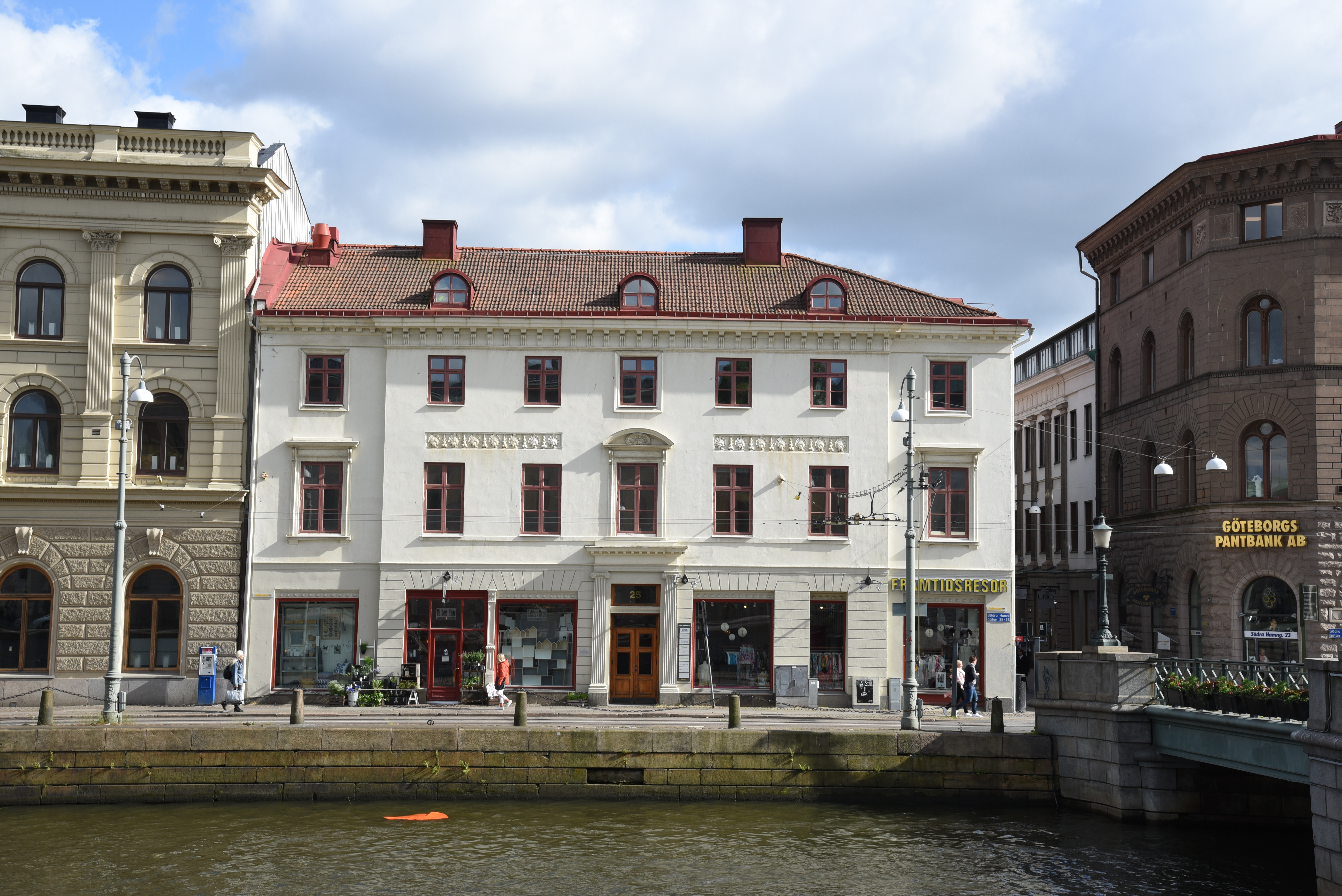 Södra Hamngatan 25, Åkermanska huset i 15 kvarteret Frimuraren i stadsdelen Inom Vallgraven i Göteborg.